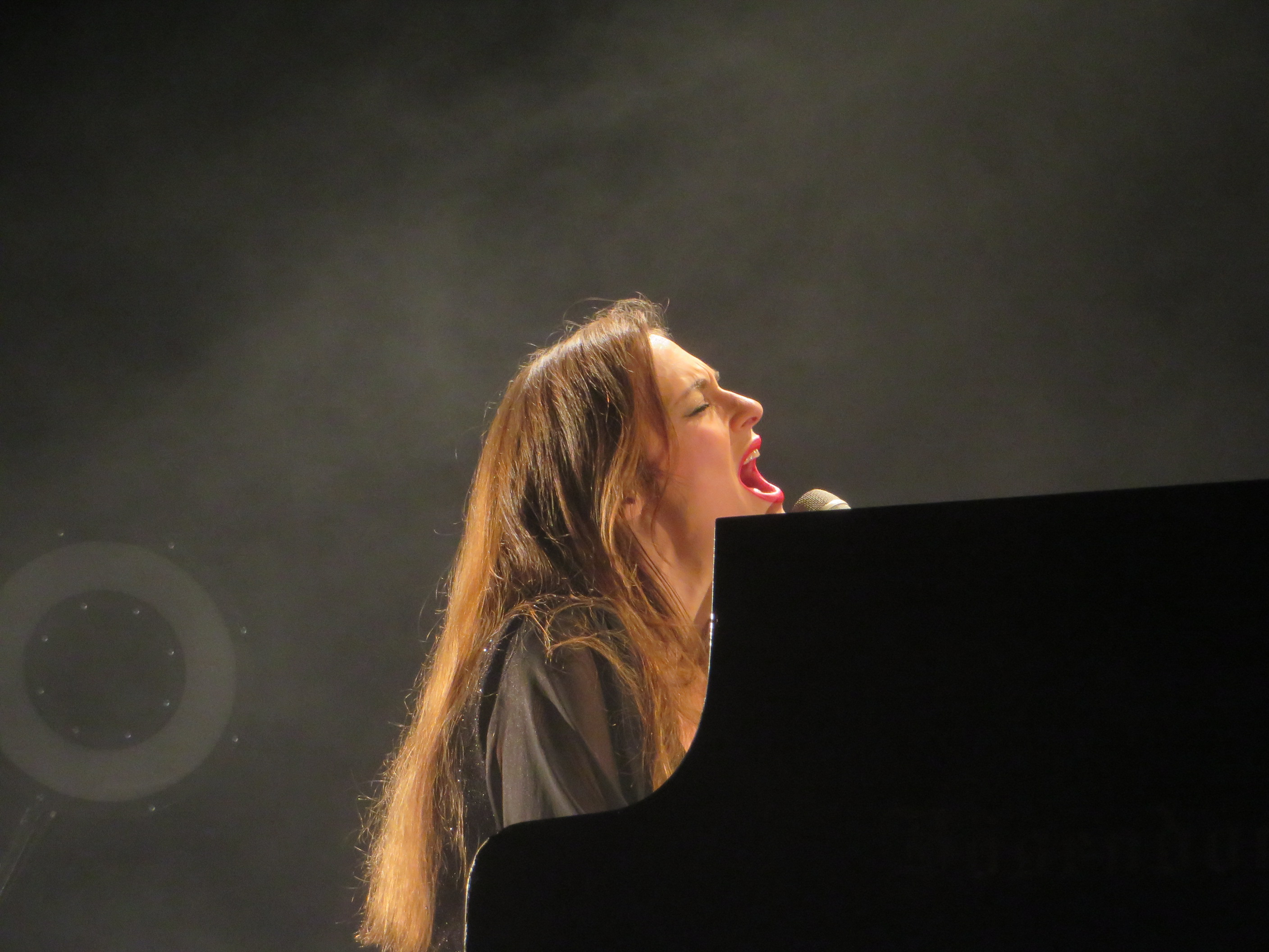 תמונה מתוך הופעה של קרן פלס בחיפה 3.1.15